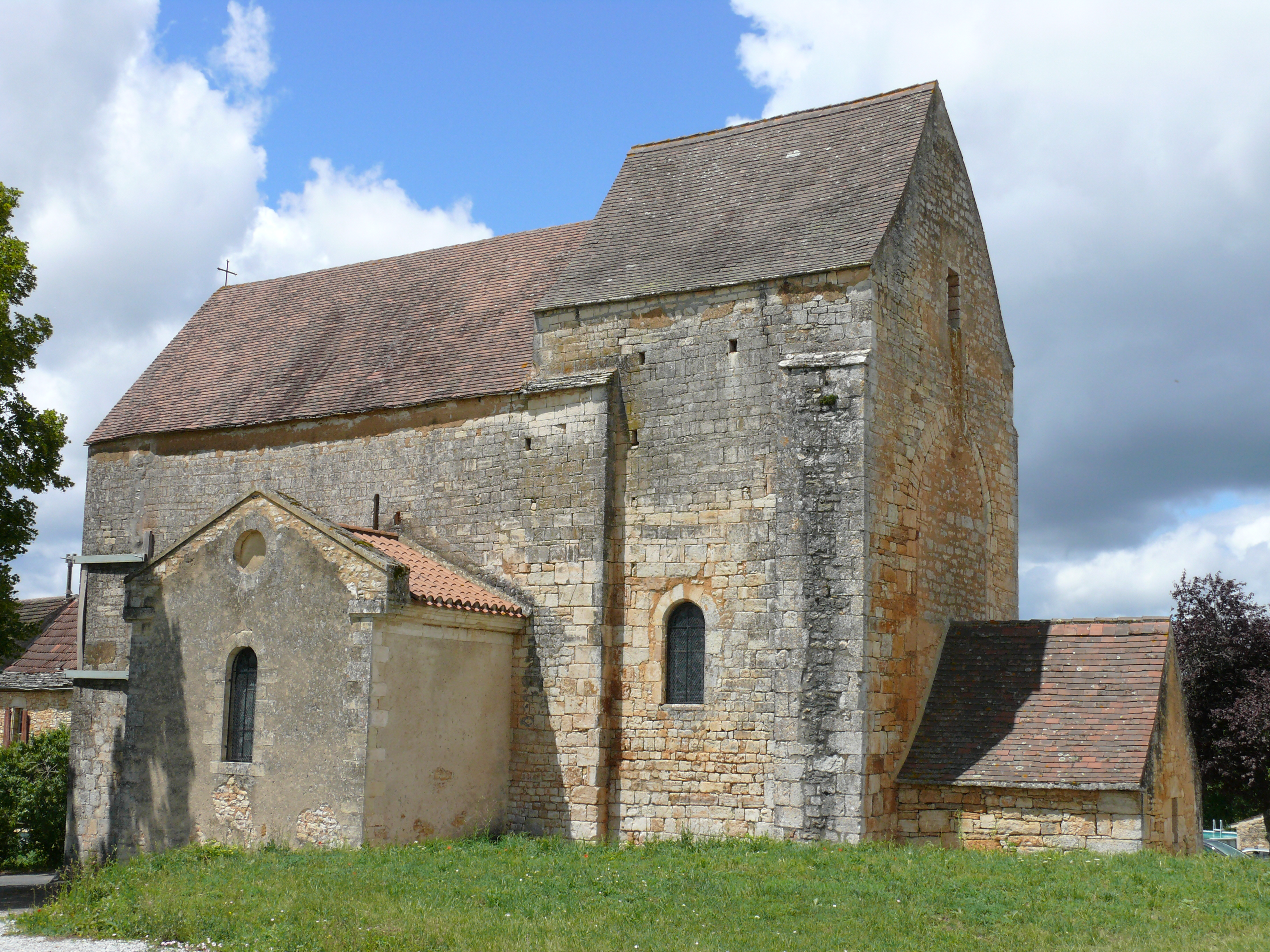 Florimont-Gaumier - Eglise Saint-Blaise à Florimont